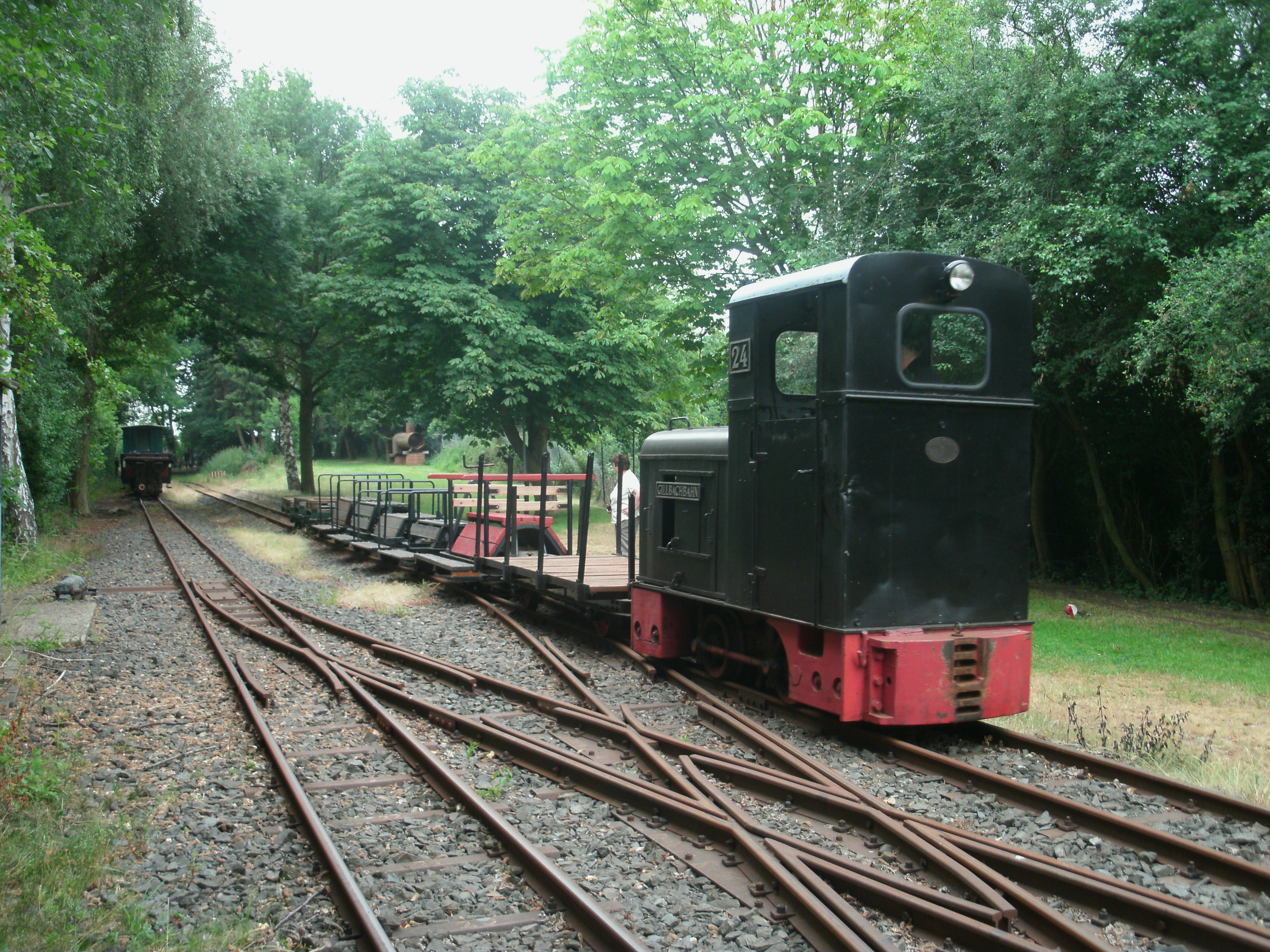 Zugkreuzung bei der Gillbachbahn (Feldbahnmuseum Oekoven) in der Einfahrt zum Bf Oekoven; rechts das Gleis vom Neurather Feld, links das vom Bahnhof An der Lohe